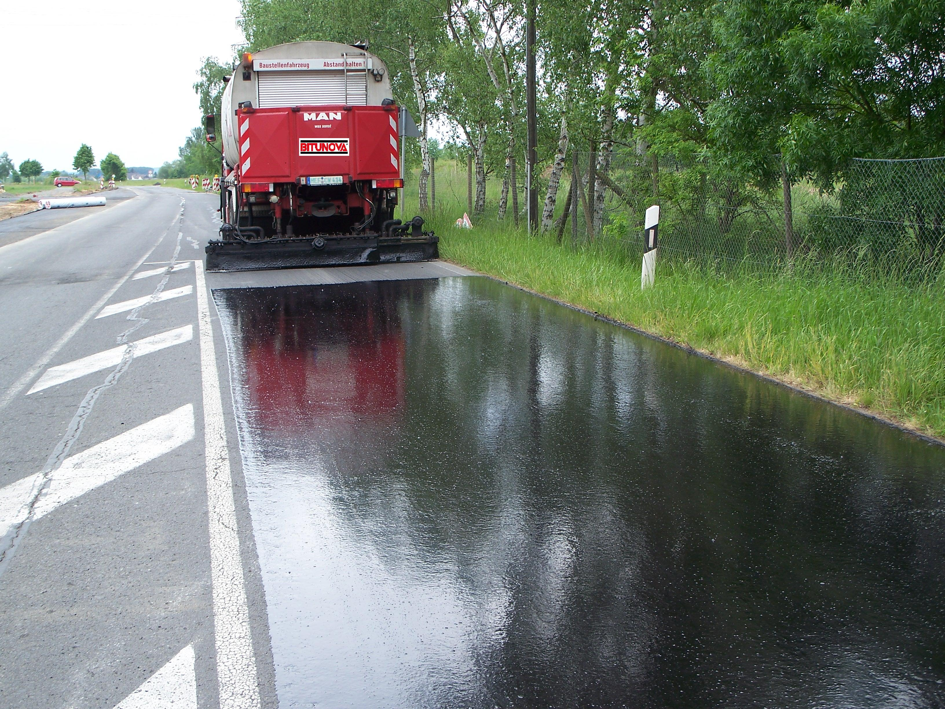 Anspritzen vor Absplitten